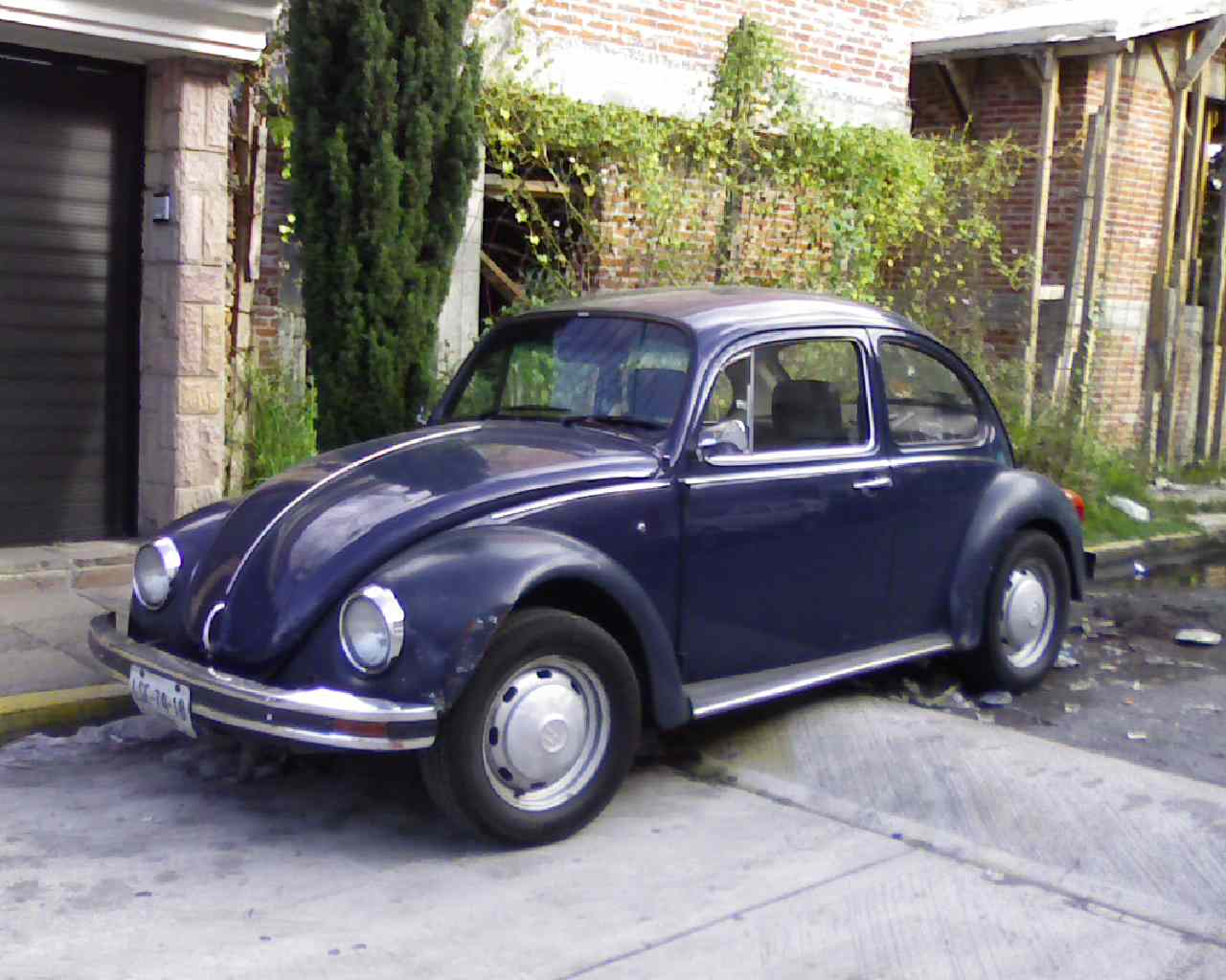 Bochopic. Volkswagen Sedán in México.